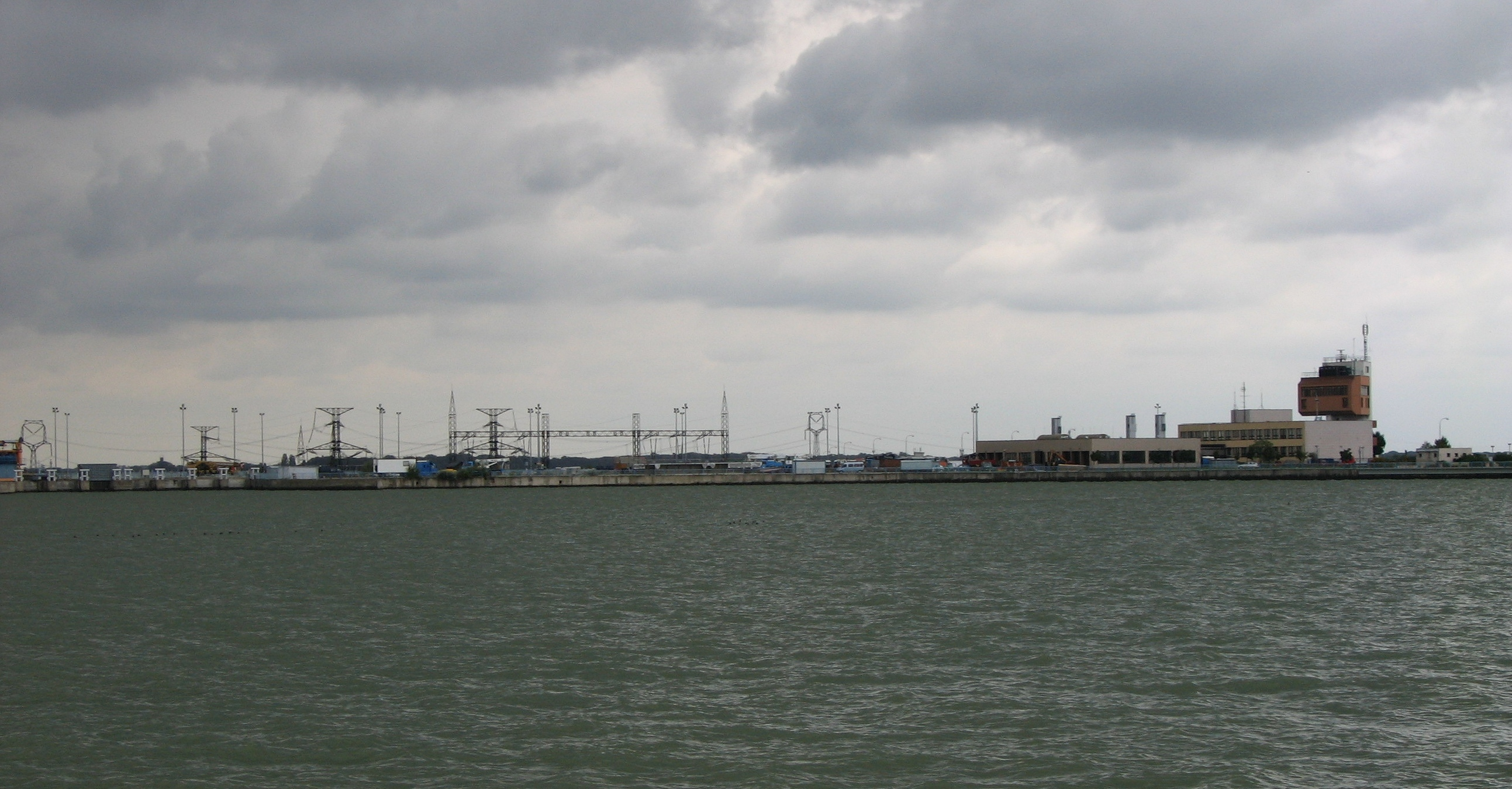 Gabčíkovo - Nagymaros Dams